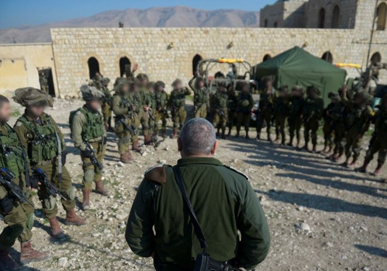 ציון לשבח ליחידת “דובדבן”.